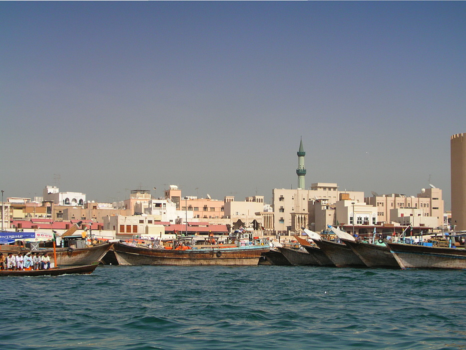 Al-Buteen, Dubai